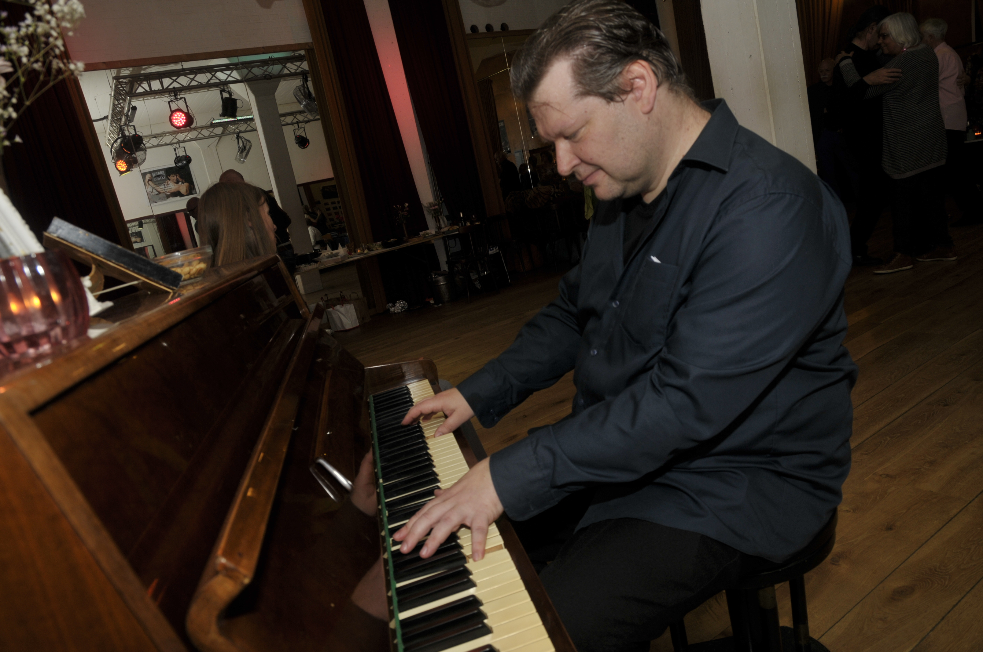 Foto in Flor de Fango, Arnhem